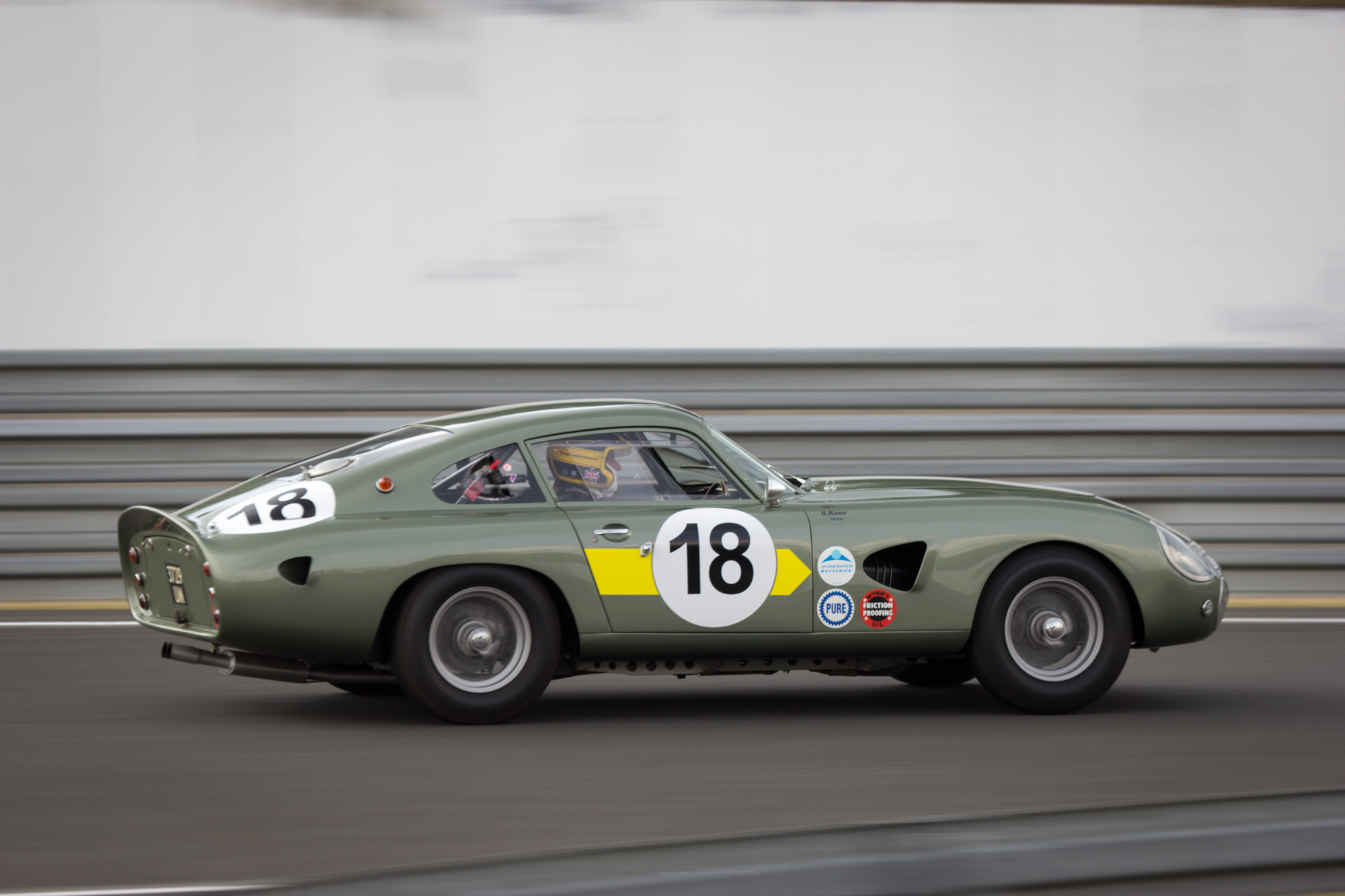 Le Mans Legend 2015 Drivers: Robert Rawe, Stephen Archer